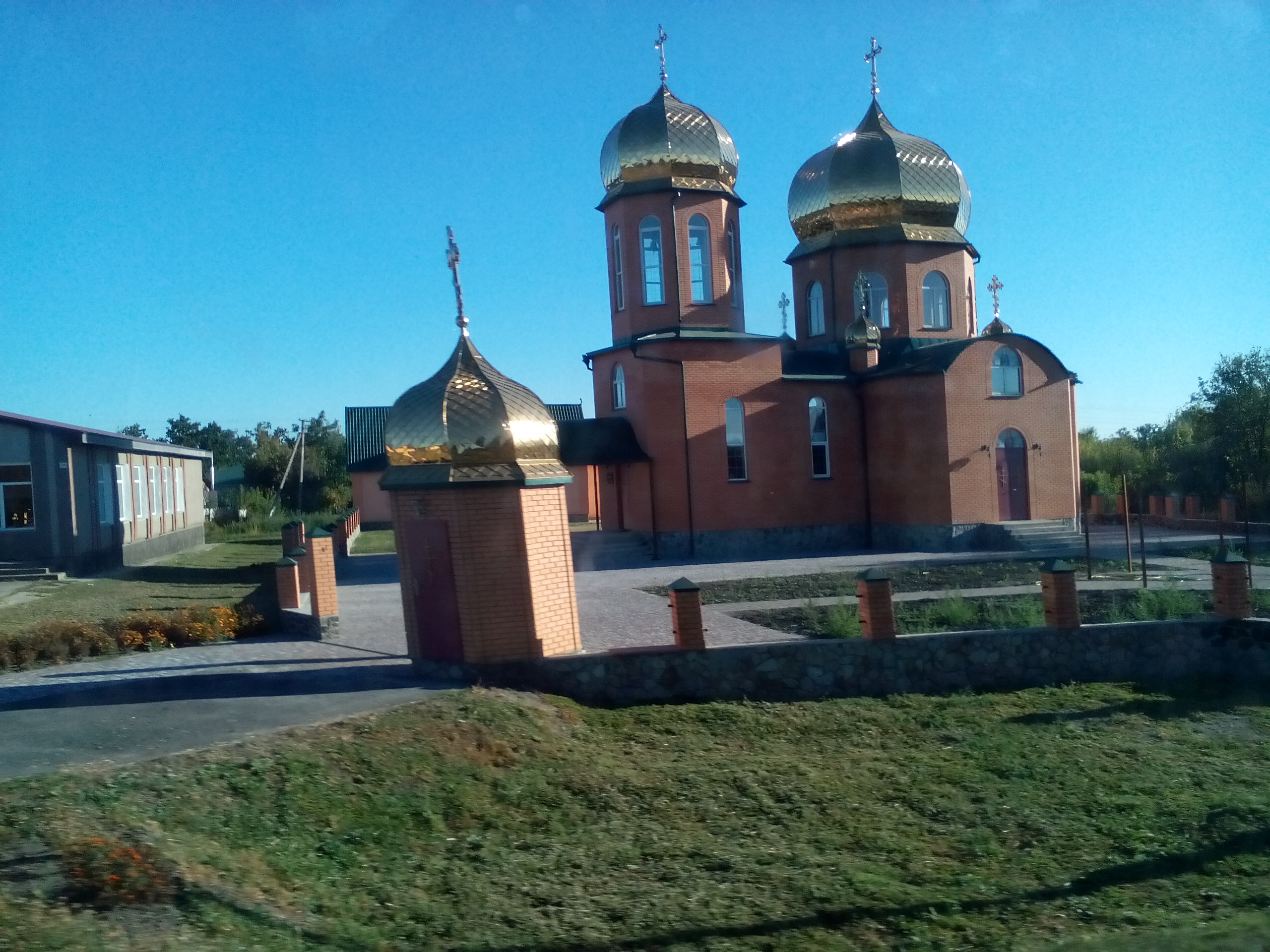 Село Степанецьке Канівського району Черкаської області